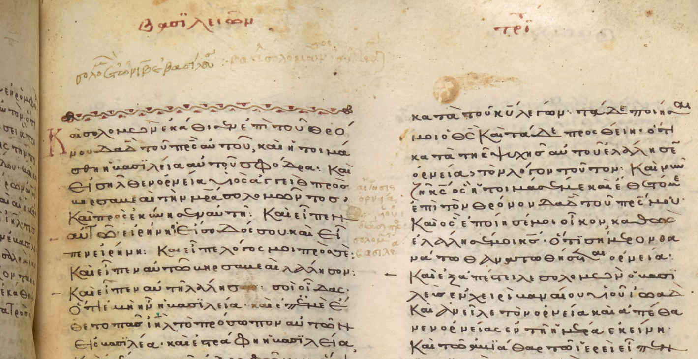 Die Handschrift Royal 1 D. II der British Library aus dem 13. Jahrhundert (Rahlfs: 93; Brooke-McLean: e2) enthält die historischen Bücher in der Fassung des antiochenischen Textes. Zu sehen ist der Anfang des 3. Buchs der "Königtümer" (mit 1Kön 2,12ff.) auf fol. 41r.